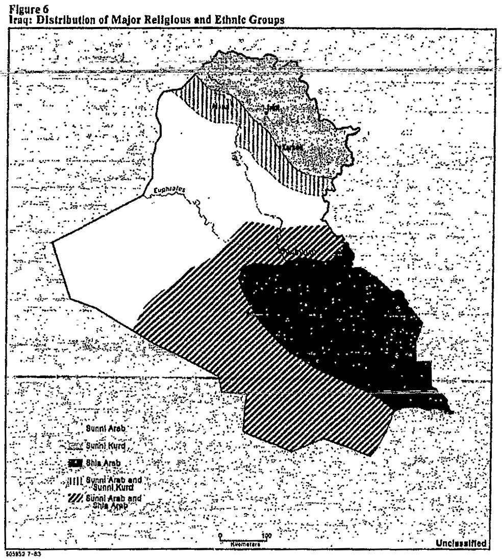 Mappatura delle etnie irachene in un prospetto analitico declassificato del 1983 a cura della CIA (ente governativo statunitense). Ricavato da (pag.22) Unica lavorazione del file: correzione bolla.